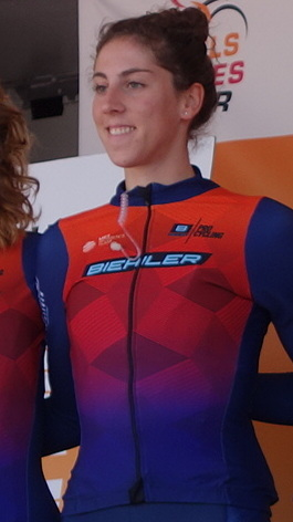 Quinty Ton (Biehler) bij de start van de eerste etappe van Stramproy naar Weert in de Boels Ladies Tour 2019